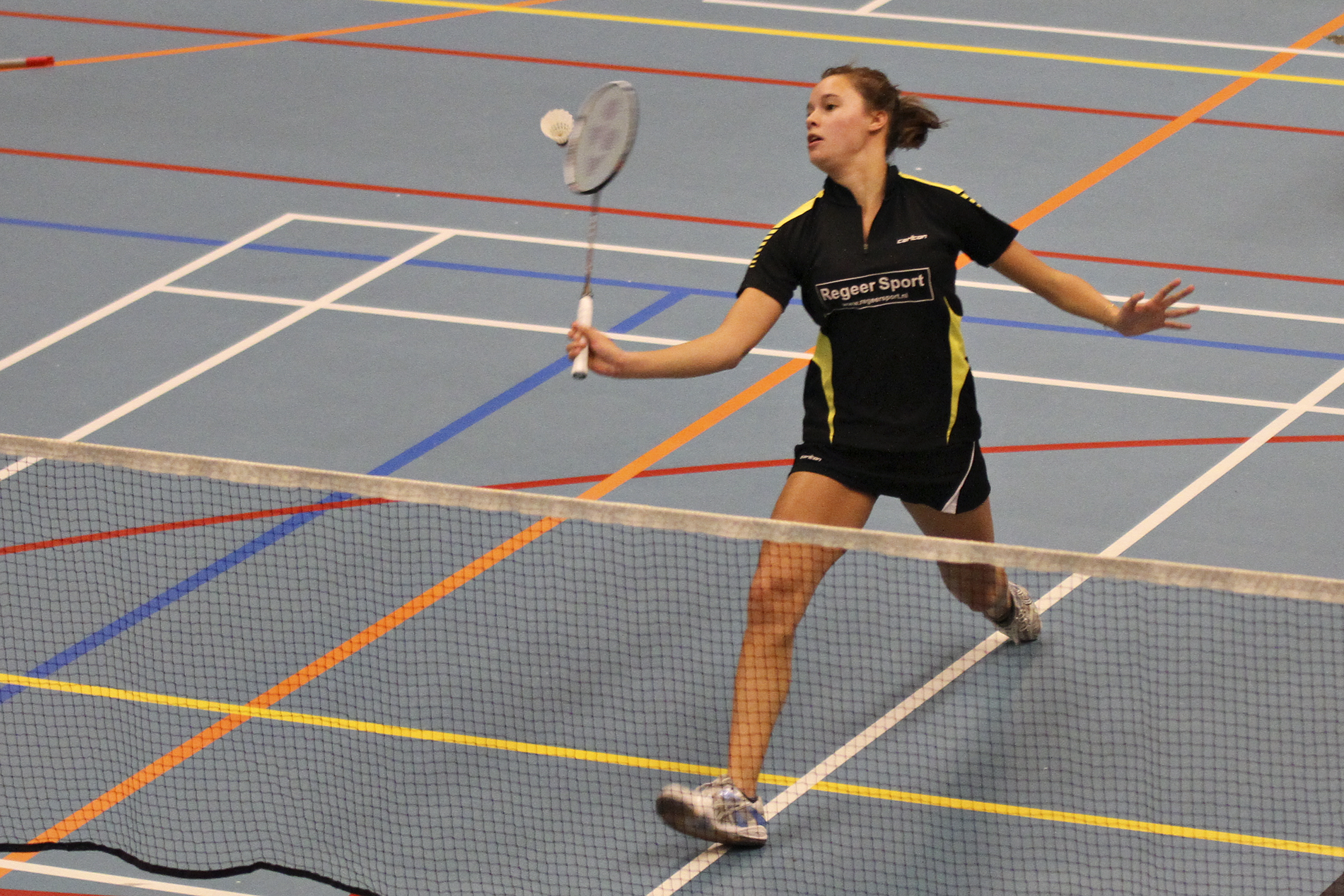 Badminton Eredivisie